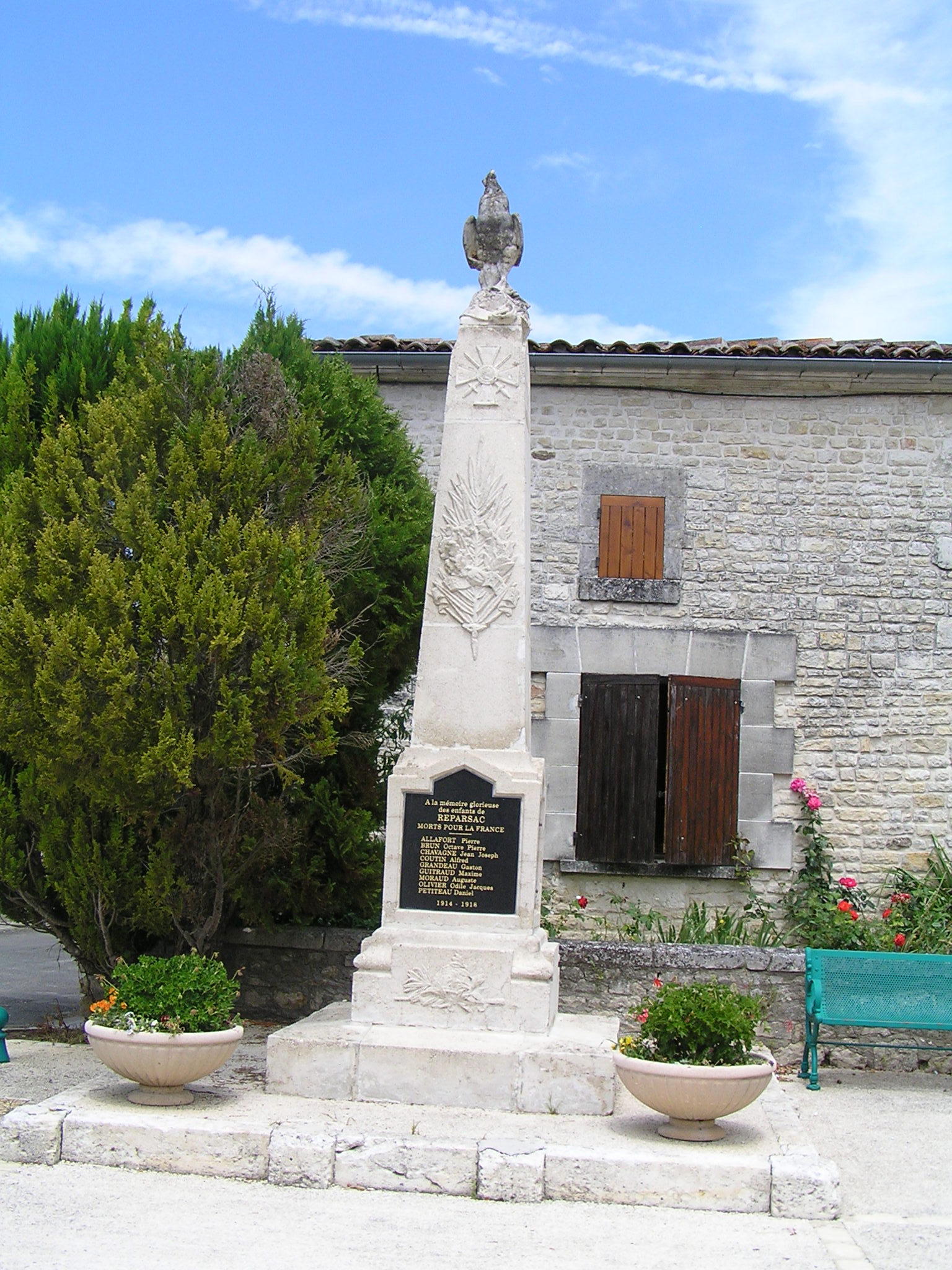 monument aux morts de Reparsac